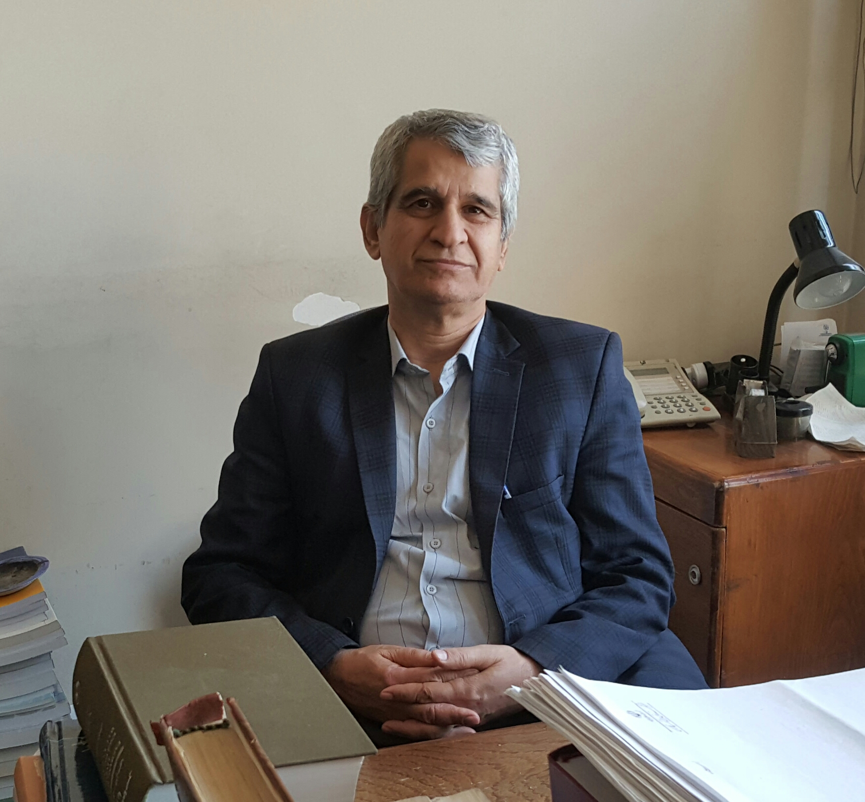 طباطبایی در فرهنگستان زبان و ادب فارسی